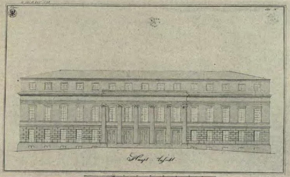 Hauptansicht für Projekt A. Entwurf für das Regierungsgebäude in Oppeln, 1824. Nicht realisiert.